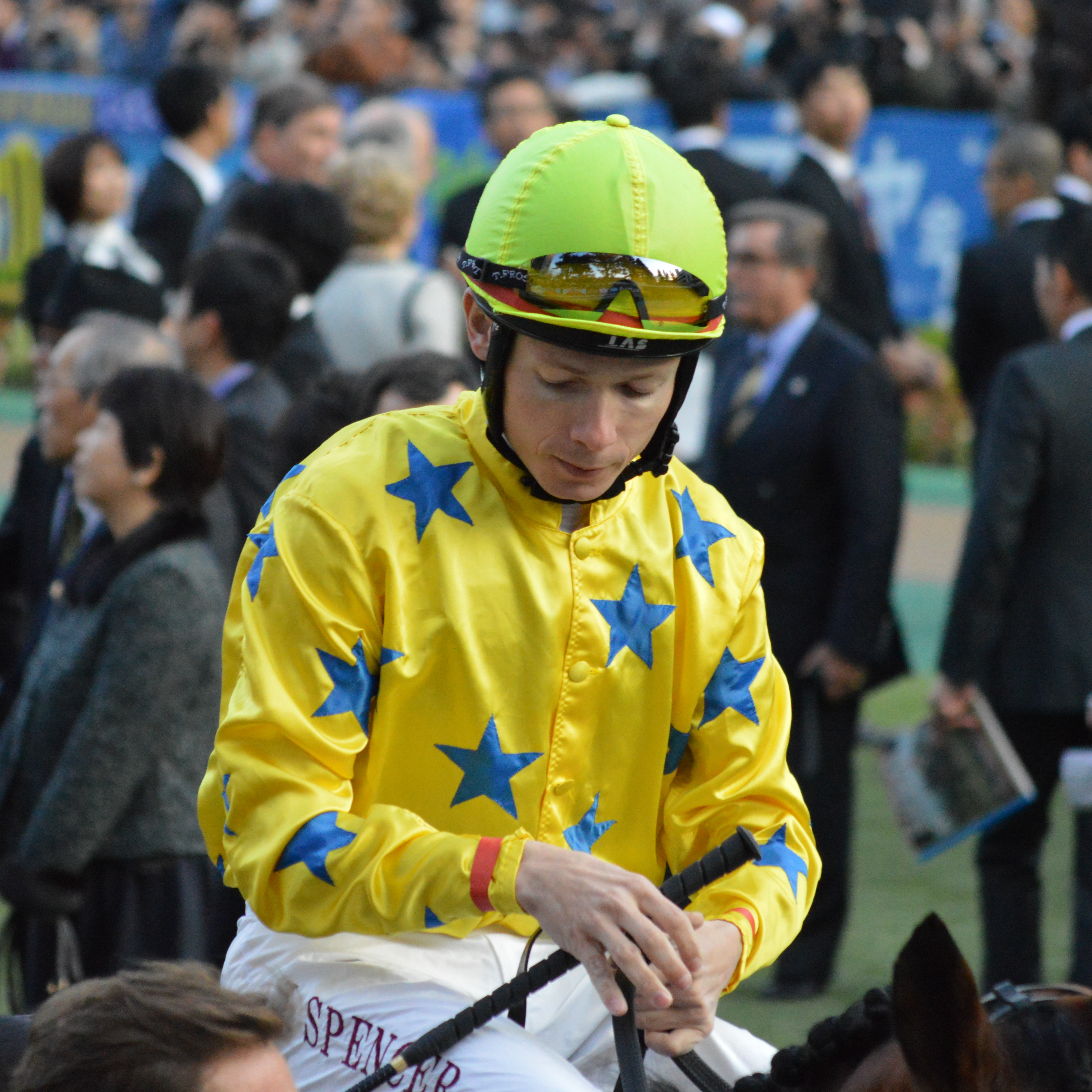 ジェイミー・スペンサー騎手（2013年ジャパンカップ/騎乗馬ドゥーナデン）Jamie P.Spencer Jockey at Tokyo Racecourse.